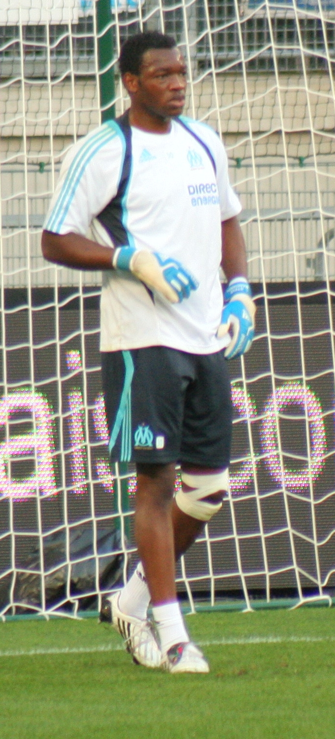 Steve Mandanda à l'échauffement lors du match Stade rennais-Olympique de Marseille le 22/08/2009